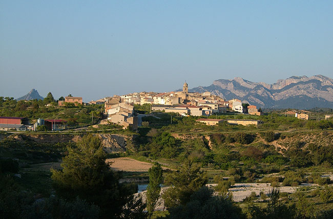 Riberes de l'Algars